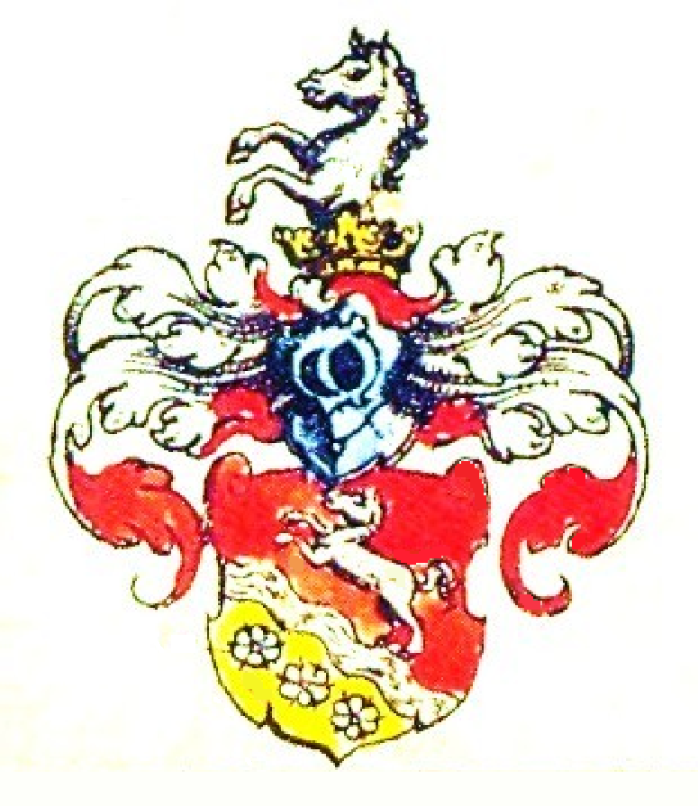 Stammwappen der von Gfug, die mit dem herzoglich liegnitzischen Kämmerer und Hofrichter Adam von Gfug die Stammreihe beginnen, der 1437 die Vogtei Niklasdorf gegen Bienowitz vertauschte und 1438 Liebenau kaufte.